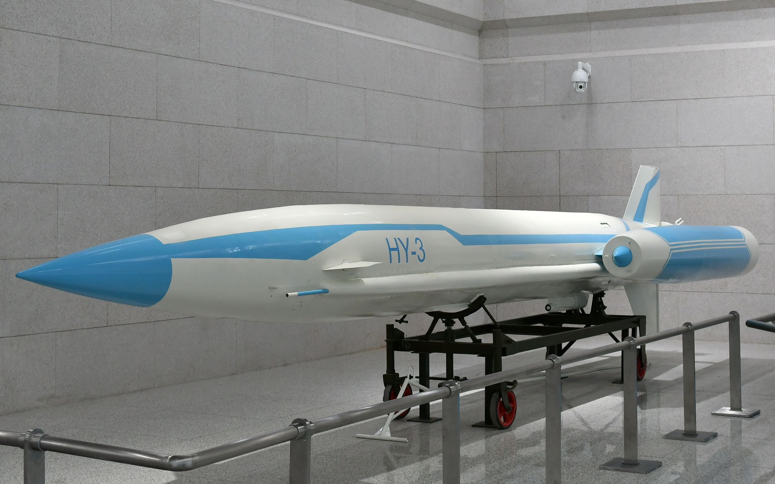 “海鹰”3号岸舰导弹，拍摄于中国人民革命军事博物馆。